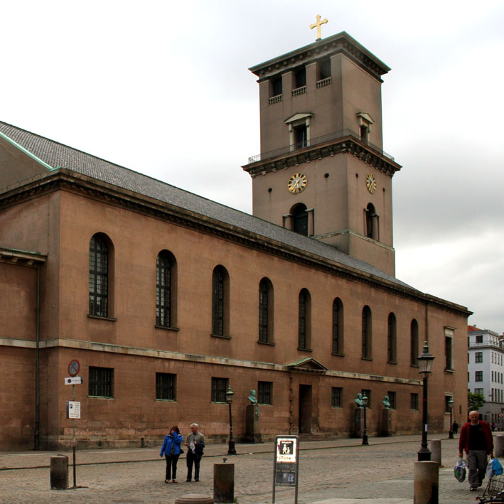 Vor Frue kirke, Copenhagen, architect C F Hansen